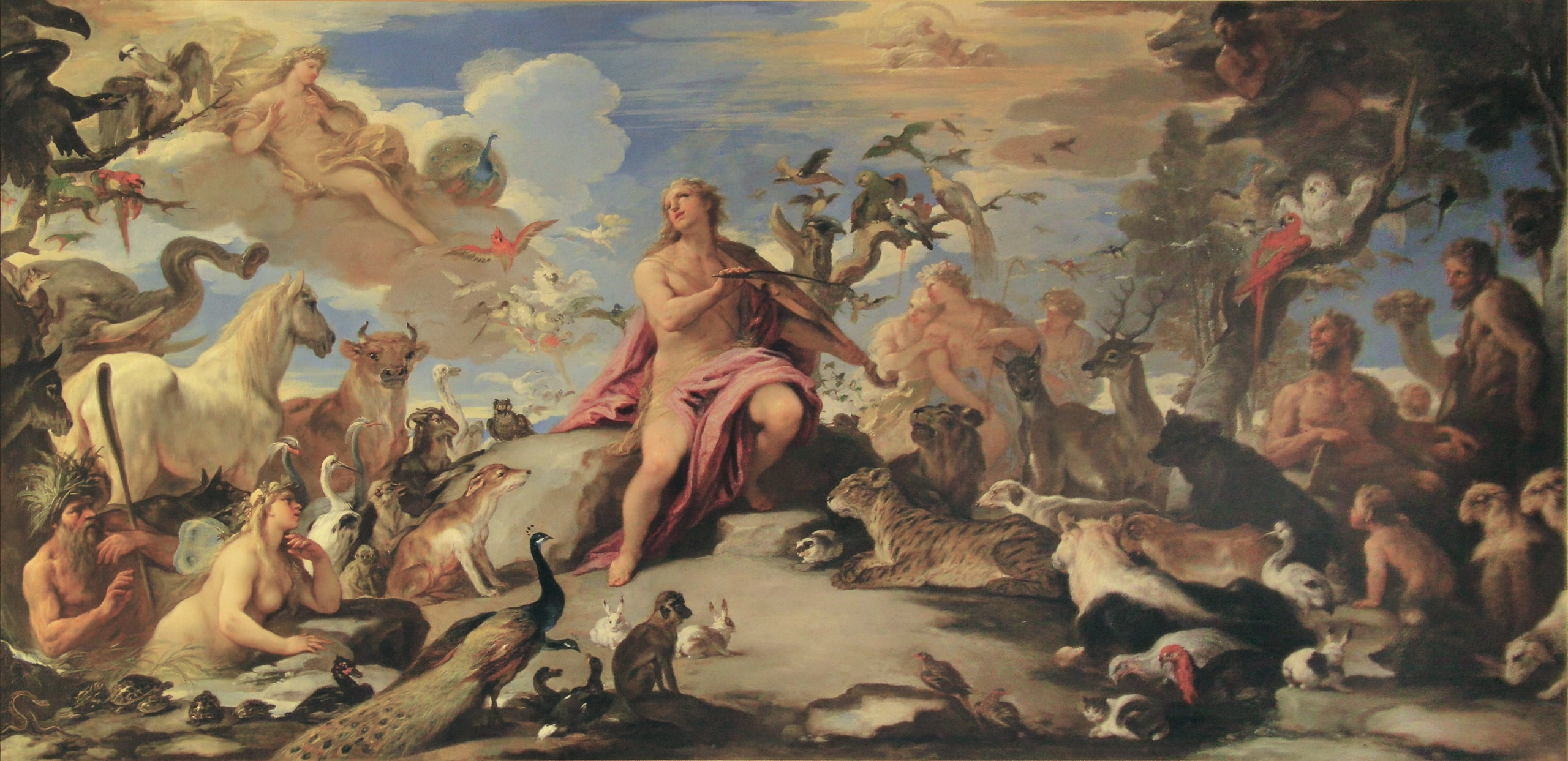 Orfeo tocando entre los animales, c. 1697, Luca Giordano . Palacio Real de Aranjuez (Madrid, España).